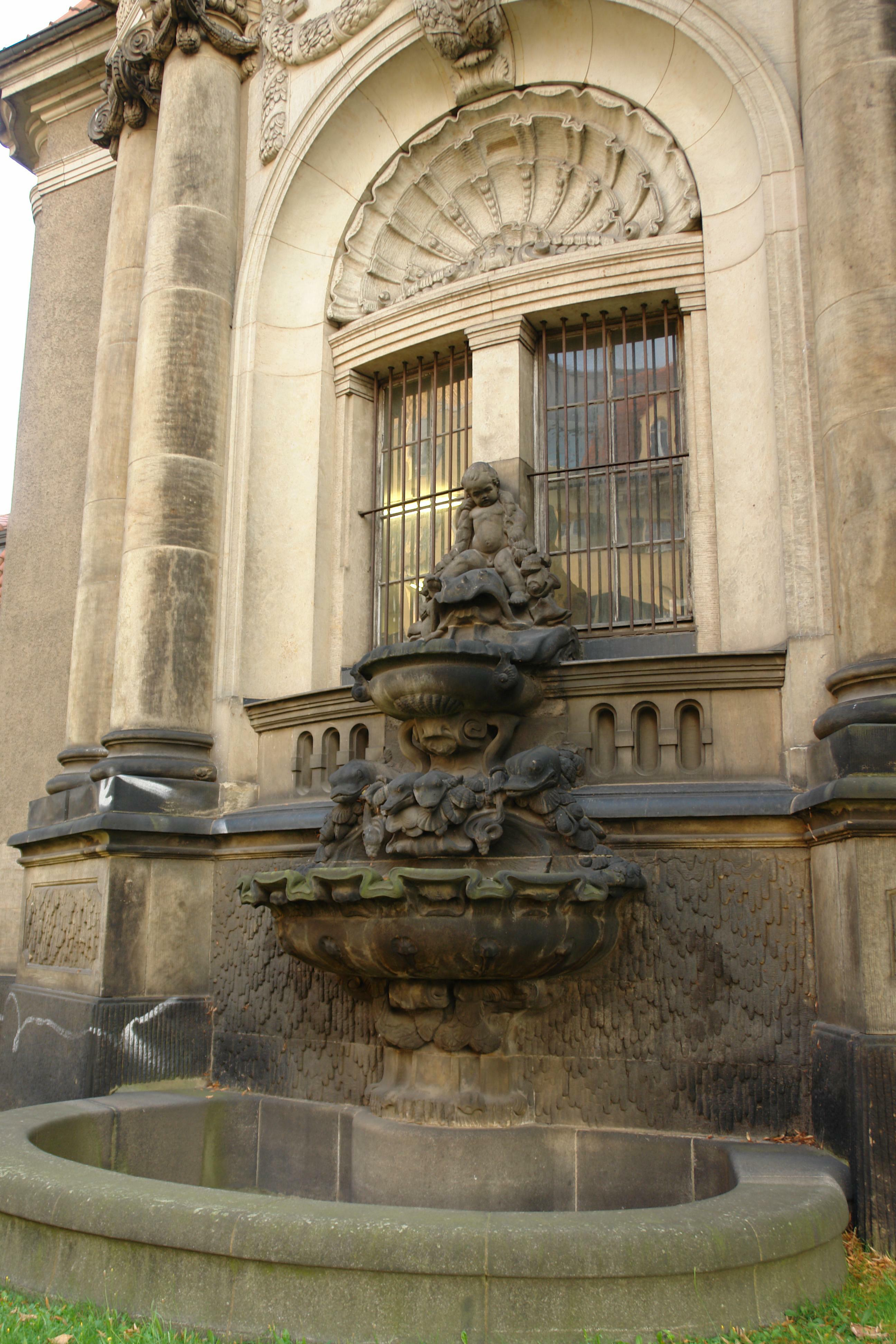 ehemaliger Brunnen an der Kunstgewerbeakademie Dresden